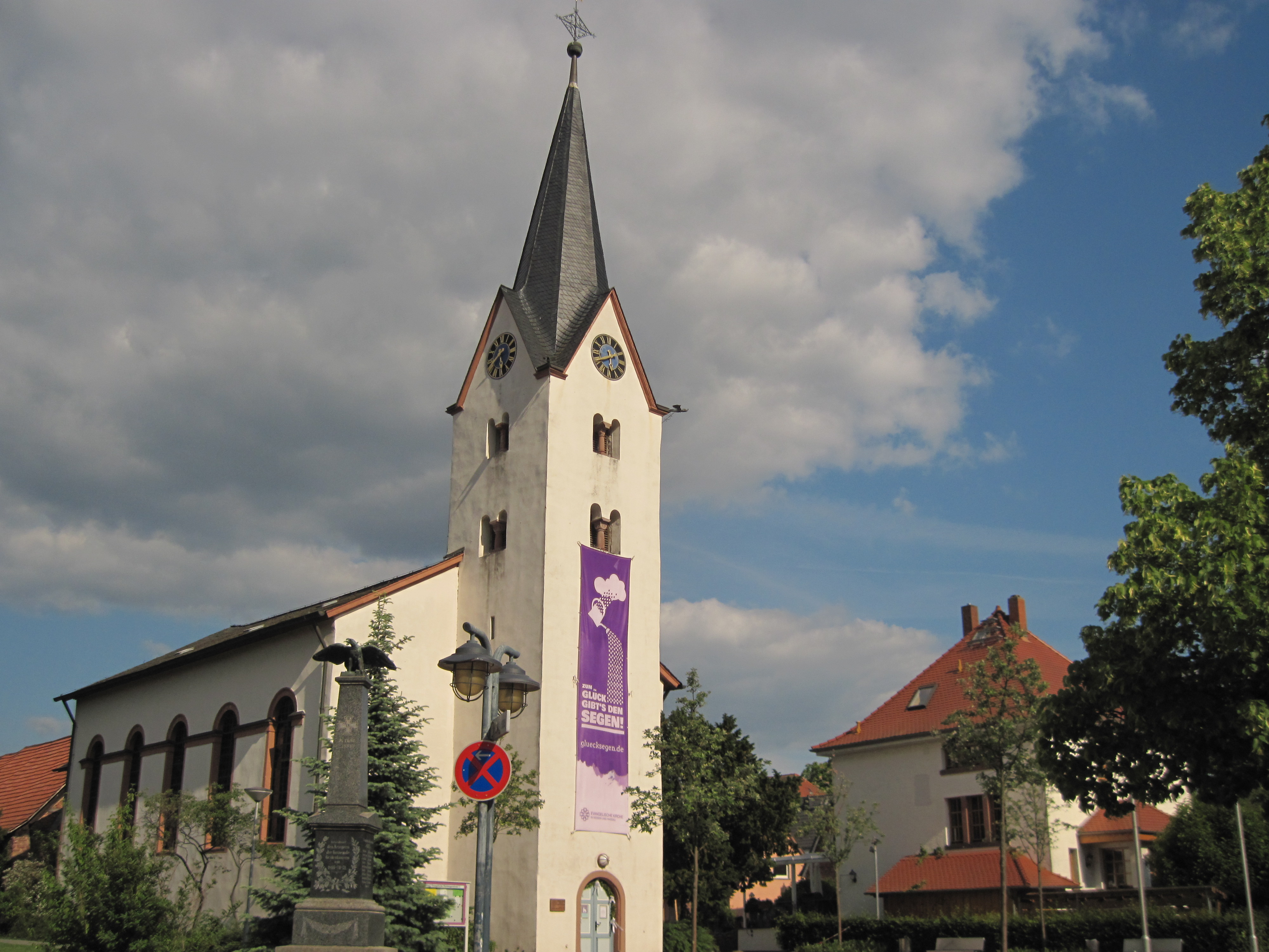 Kirche, Gräfenhausen, Darmstädter Straße 8